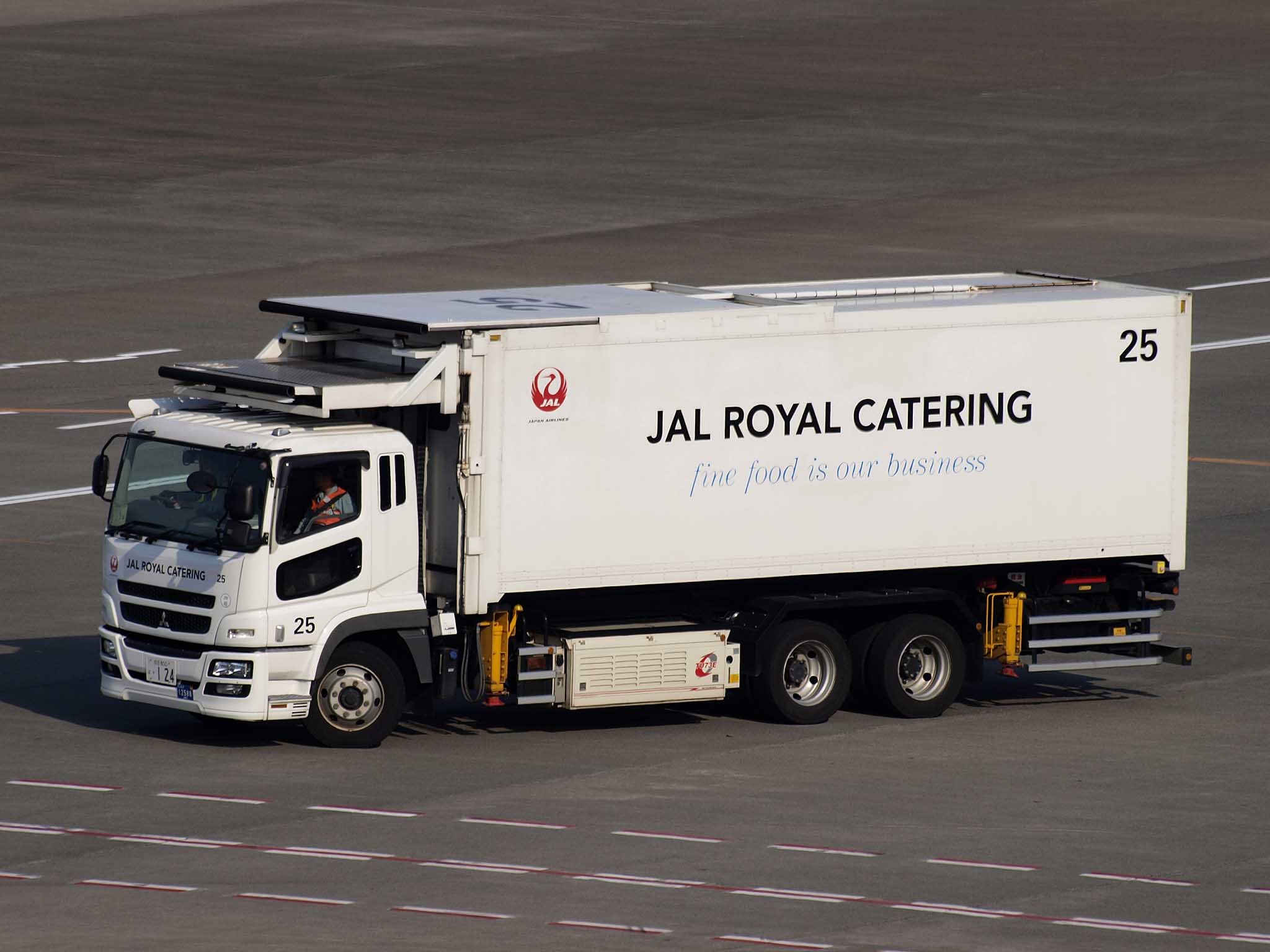 ジャルロイヤルケータリングのフードローダー。成田空港と羽田空港で日本航空国際線向けを中心に機内食調製・搭載業務を担当する。 車種：三菱ふそう・スーパーグレート 架装：犬塚製作所 登録番号 陸運局：成田800は・124 航空局 RJAA-JRC12588 撮影地：成田国際空港第二ターミナル